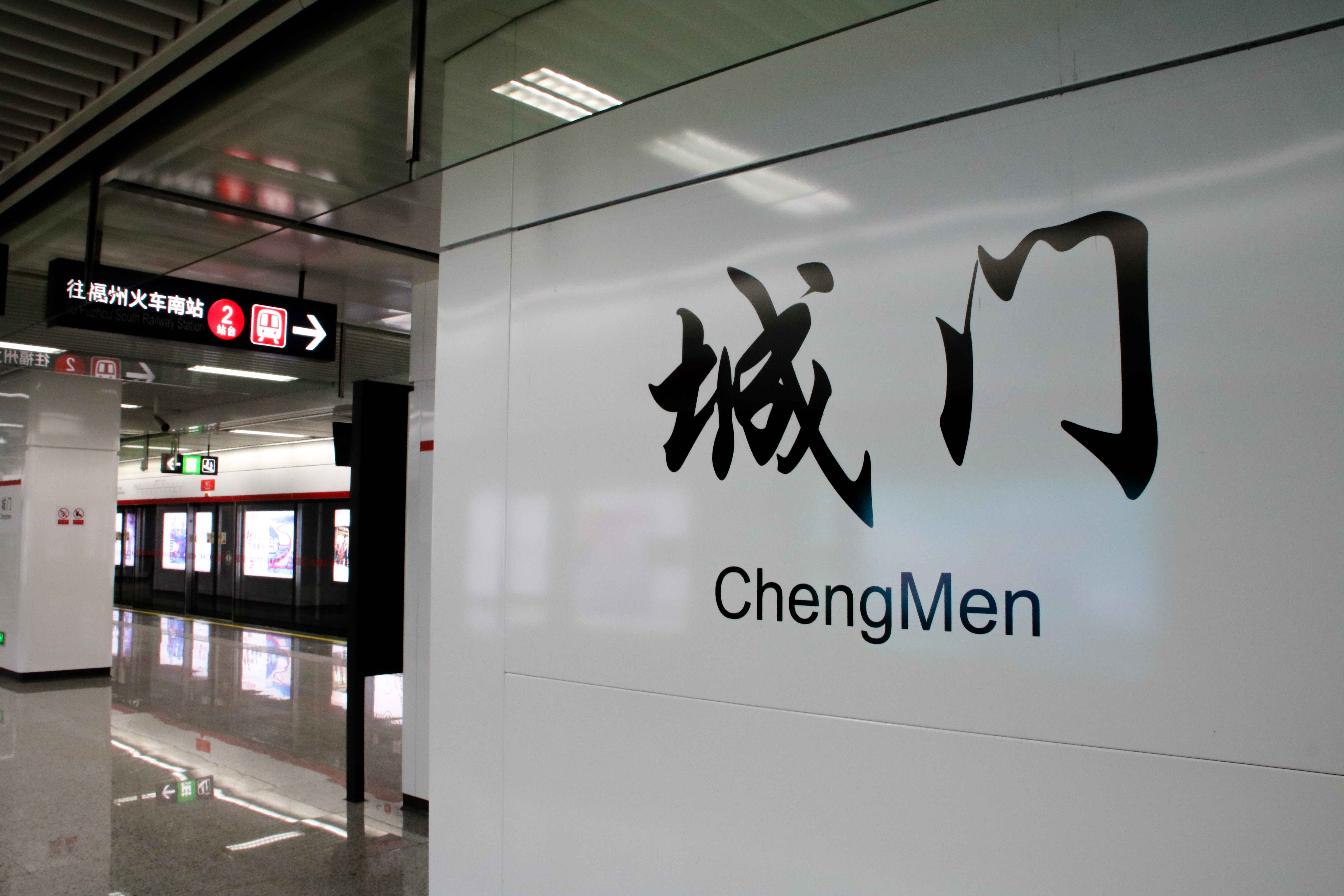 城门站站名牌